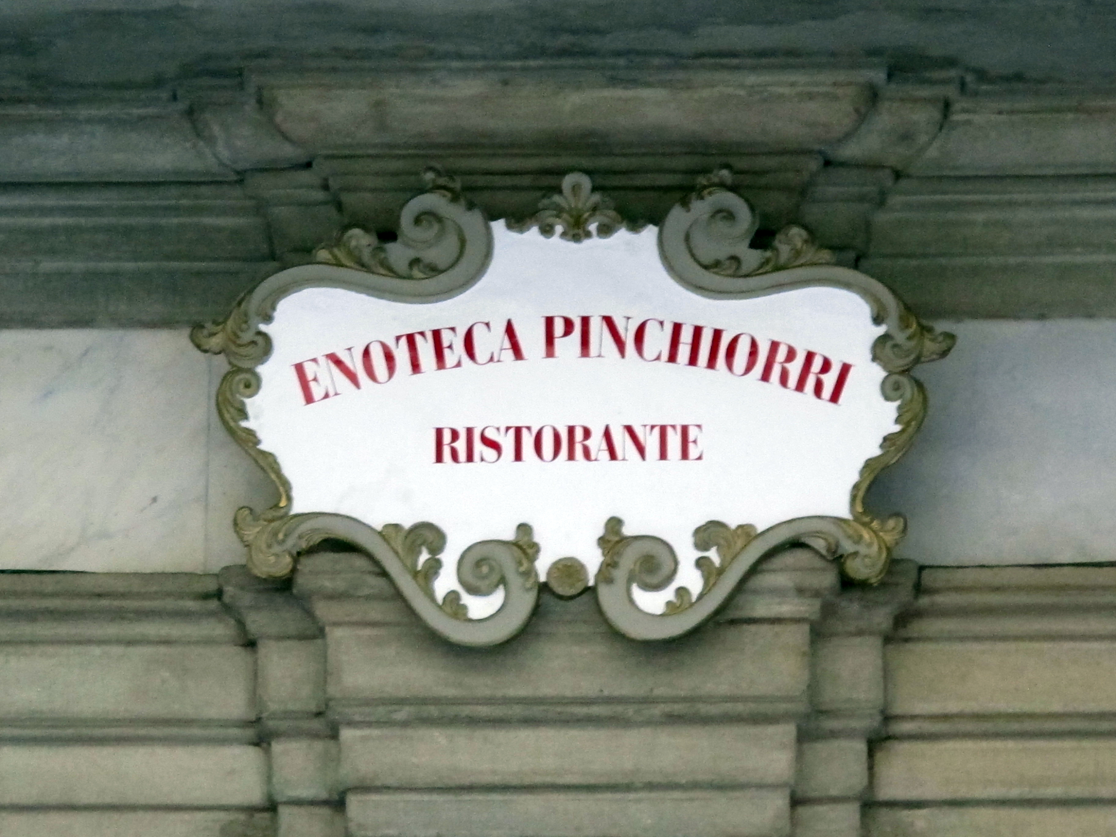 Via ghibellina 96, palazzo jacometti ciofi, insegna enoteca pinchiorri